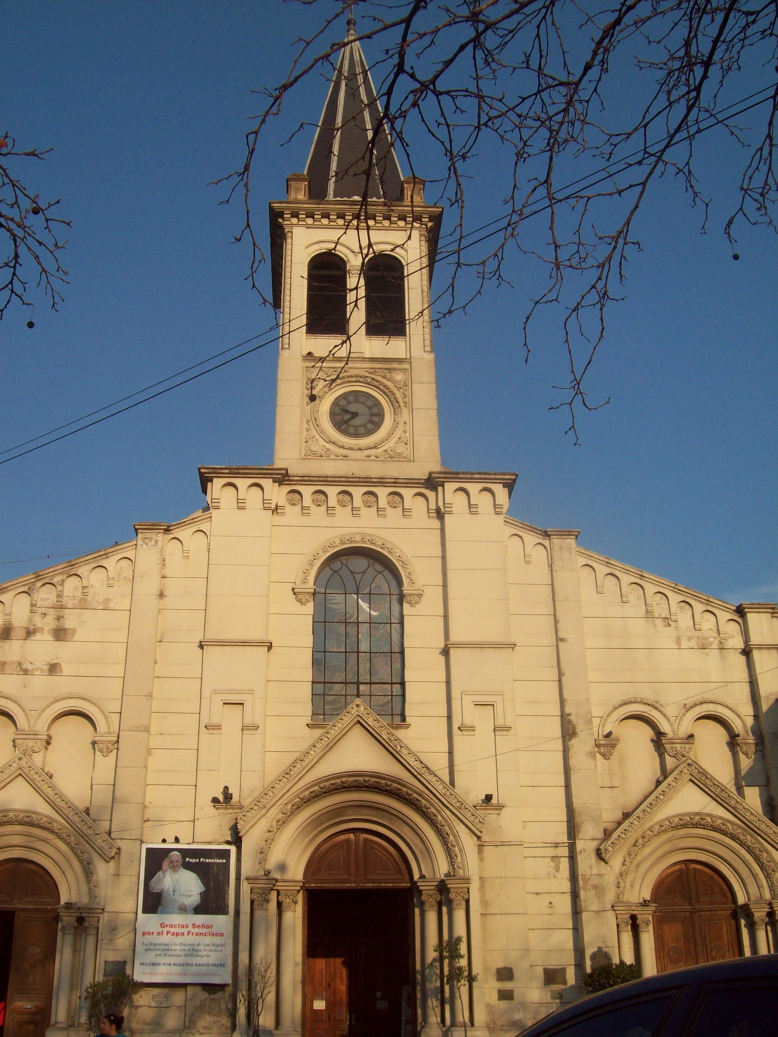 Parroquia Catedral San Miguel Arcángel, de la localidad de San Miguel